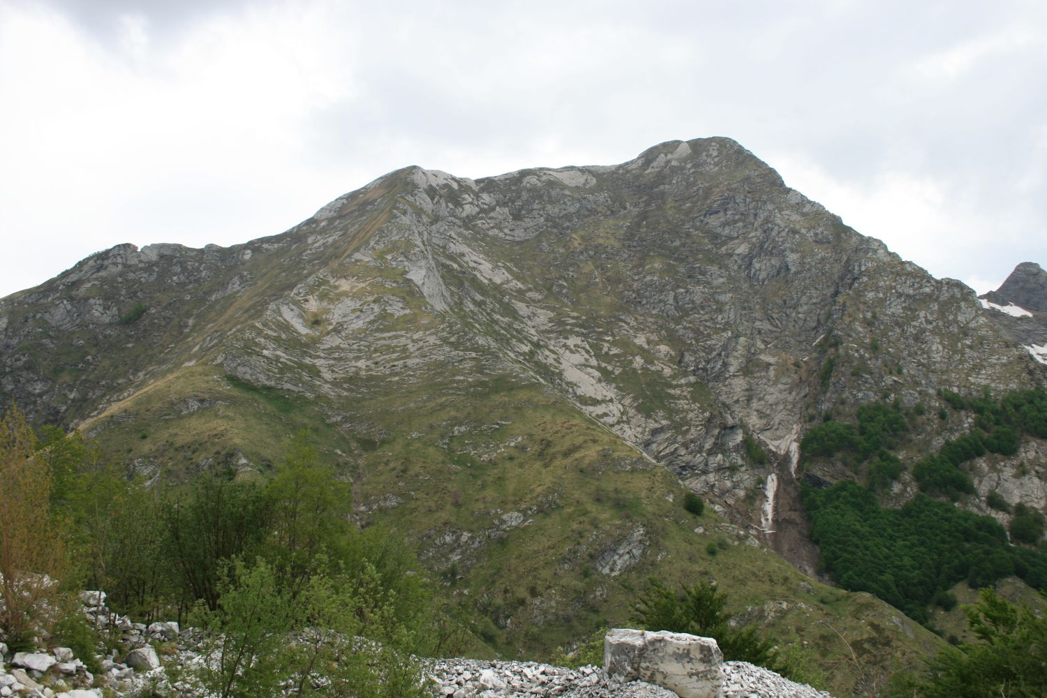 Italy: Toscana, Prov. Lucca, Parco Regionale delle Alpi Apuane, Monte Pisanino (1946 m).